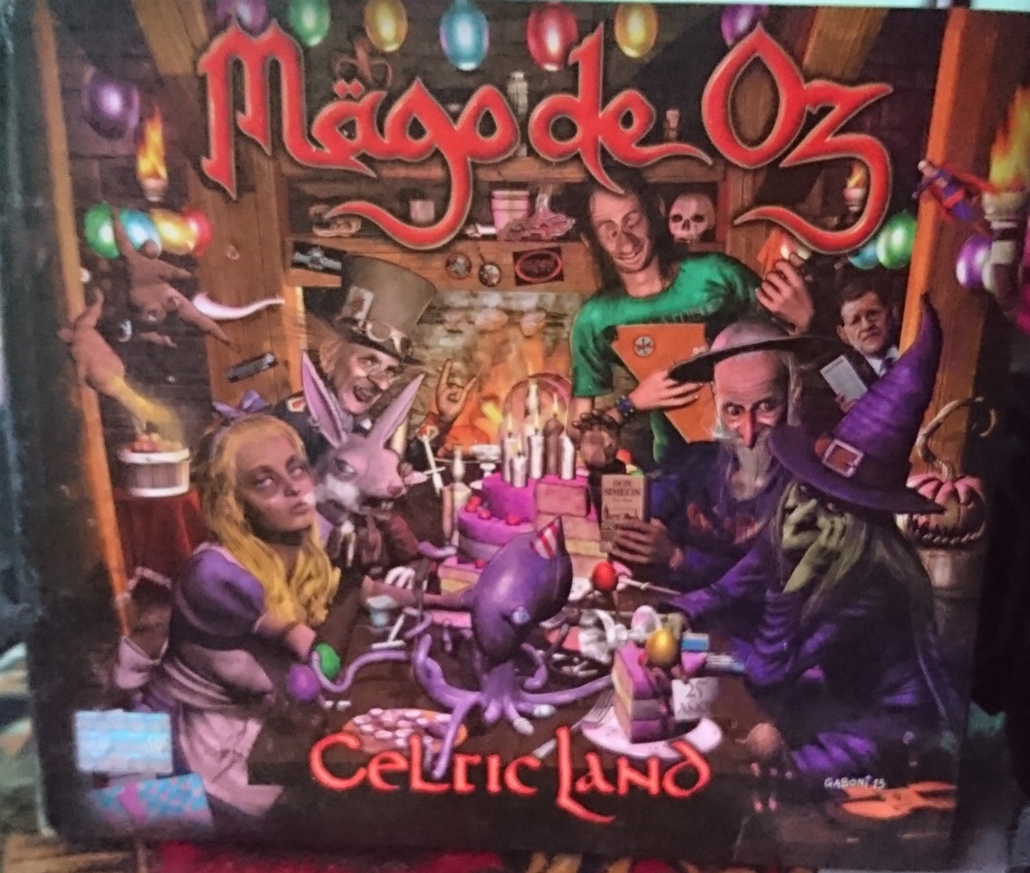 Mägo de Oz